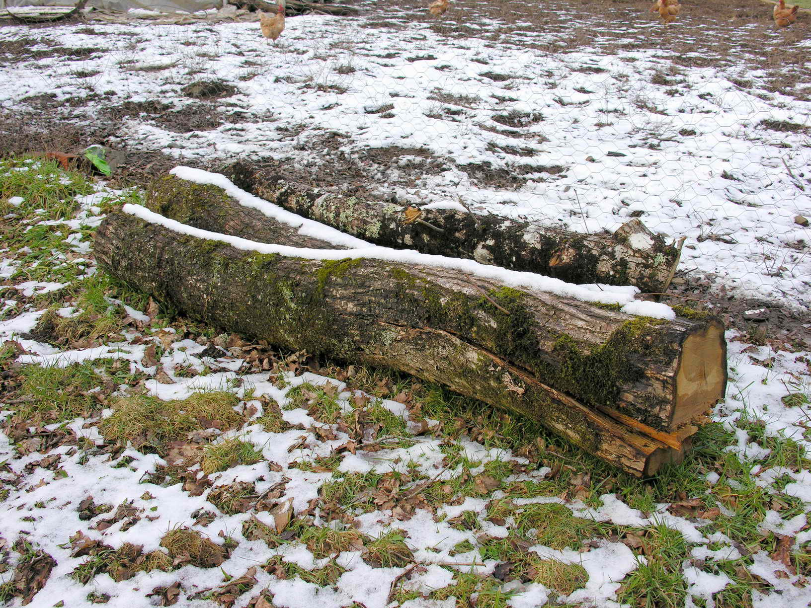 self made. Arzúa - Galicia - Spain